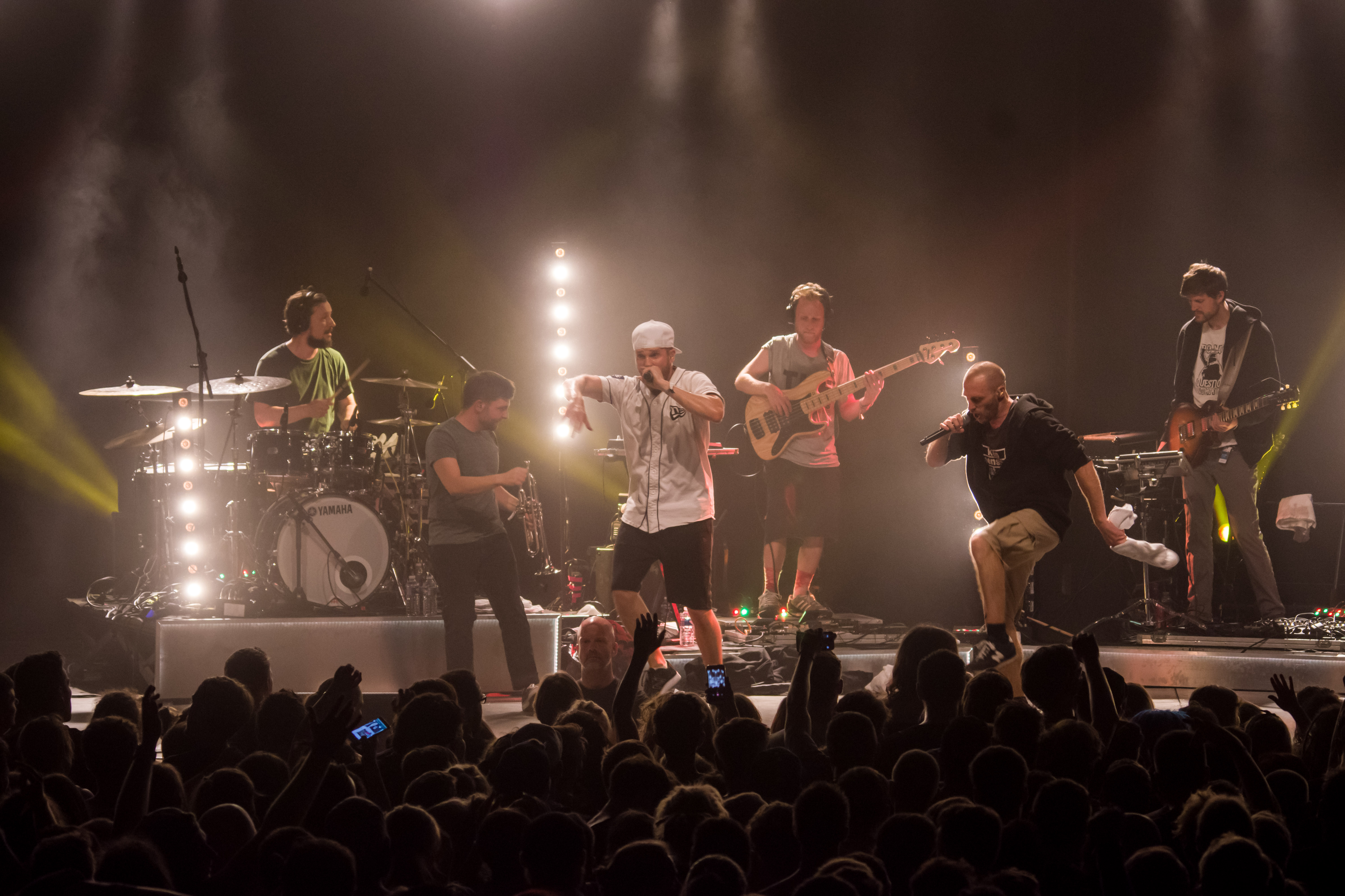 Das Zelt-Musik-Festival 2017 in Freiburg im Breisgau 15.07.2017 Irie Révolté